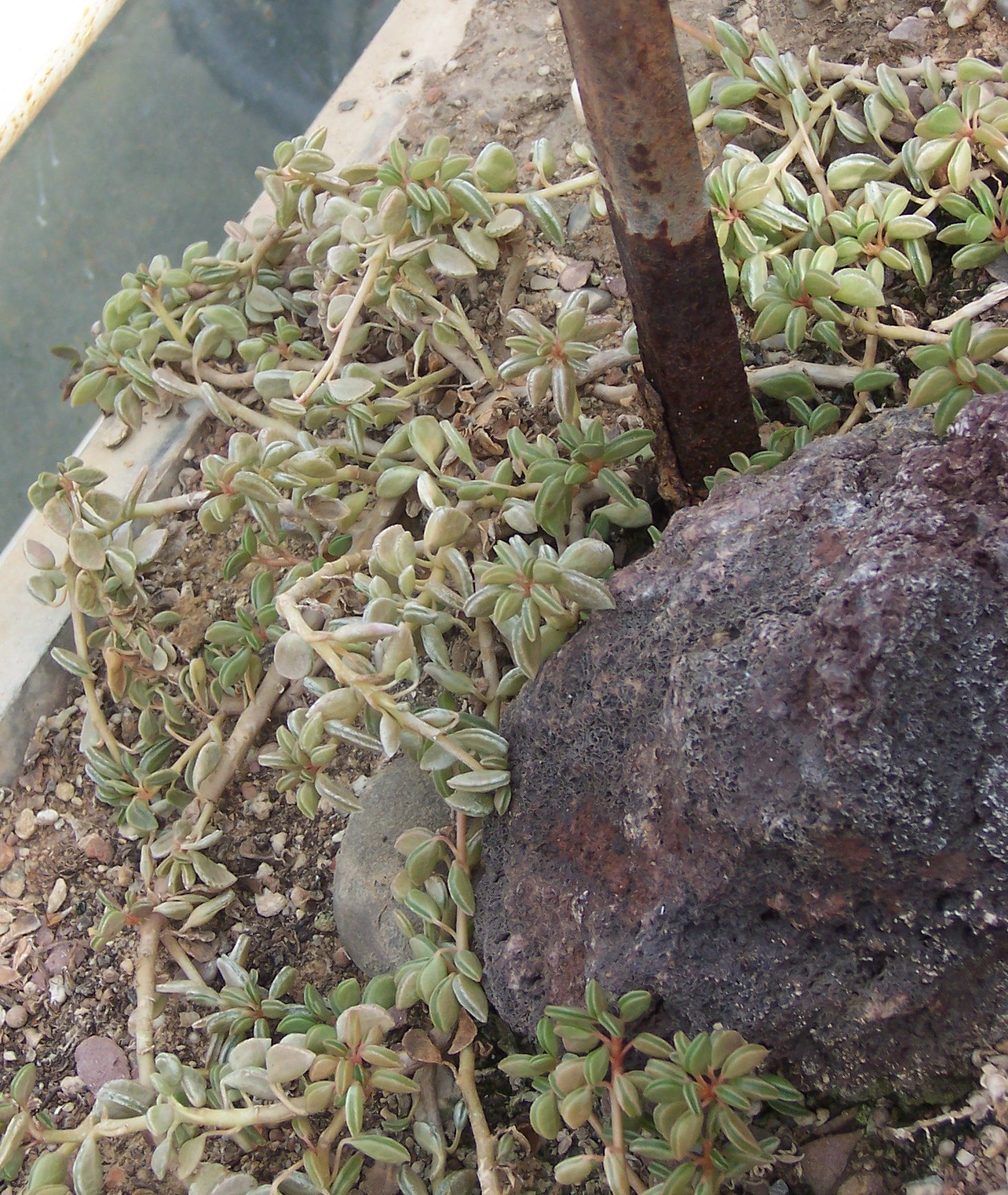 Peperomia nivalis var. (ssp.?) crassa, habitus